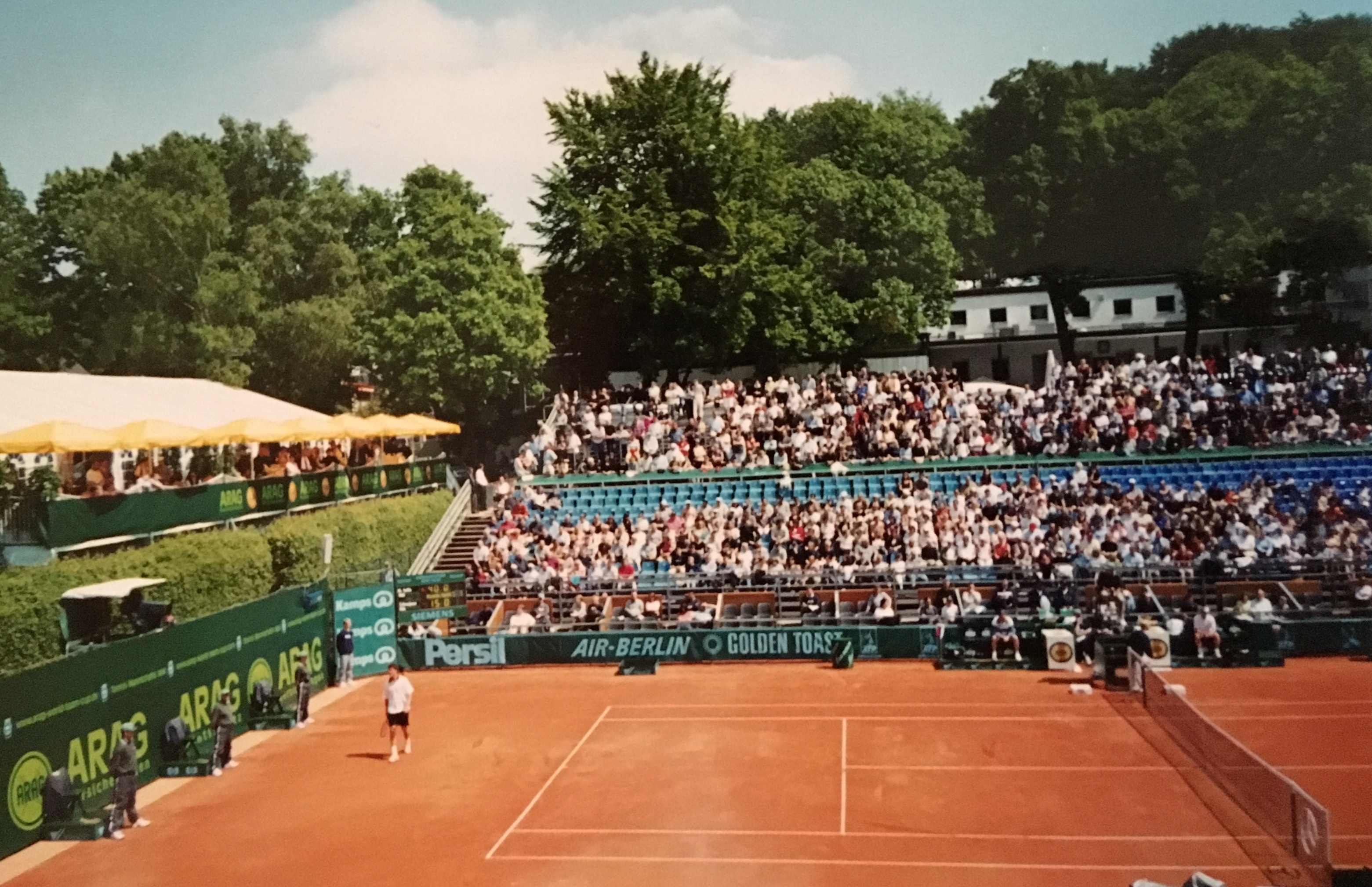 Der Center Court II im Mai 2001 (Safin vs. Grosjean beim ARAG World Team Cup)